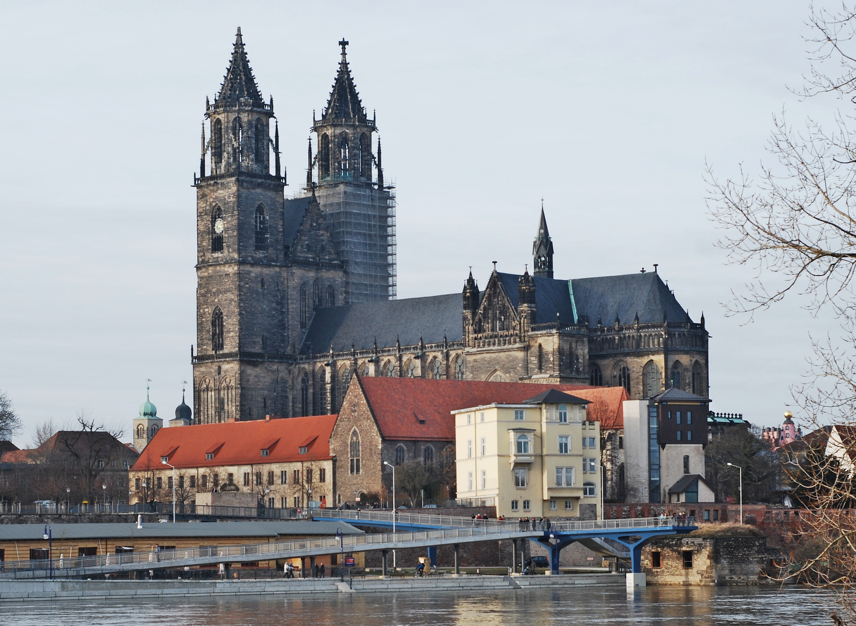 Magdeburger Dom